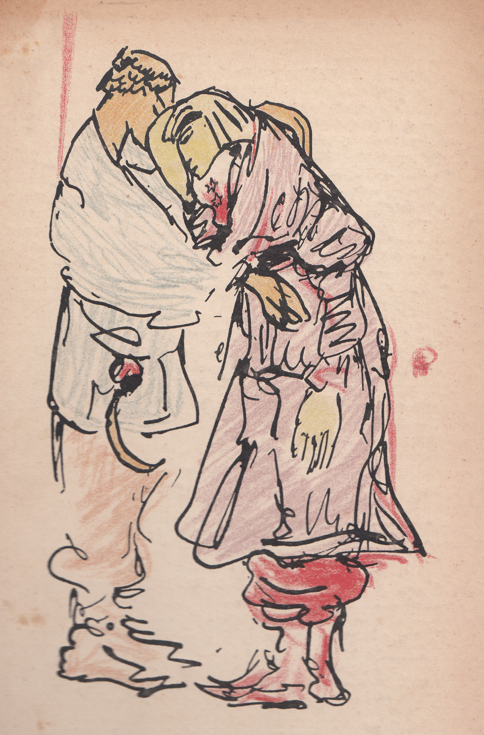 Deckblatt der Gesammelten Gedichte von Else Lasker-Schüler (1917)